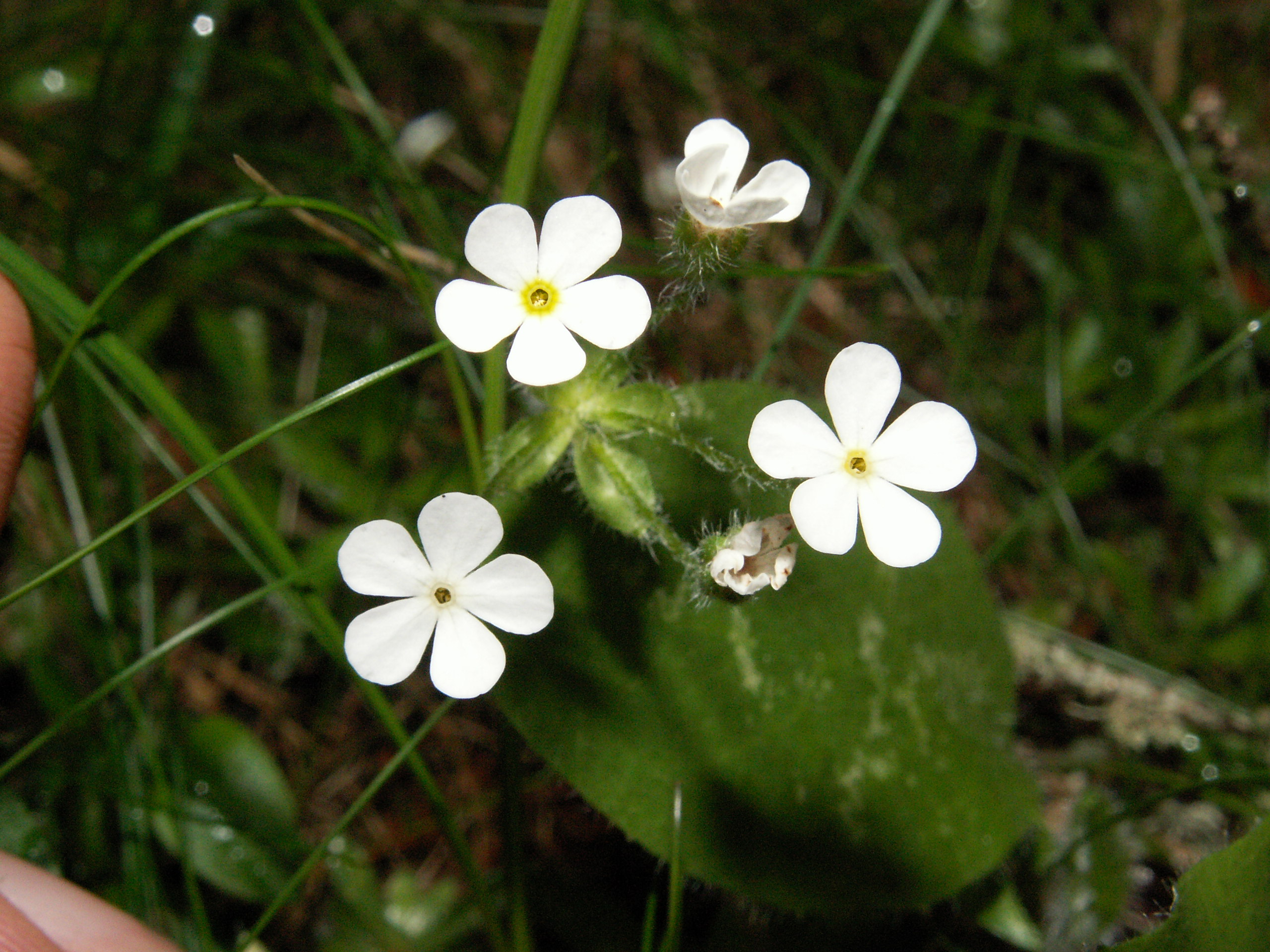 Androsace chamaejasme, Schynige Platte, Kanton Bern, Schweiz